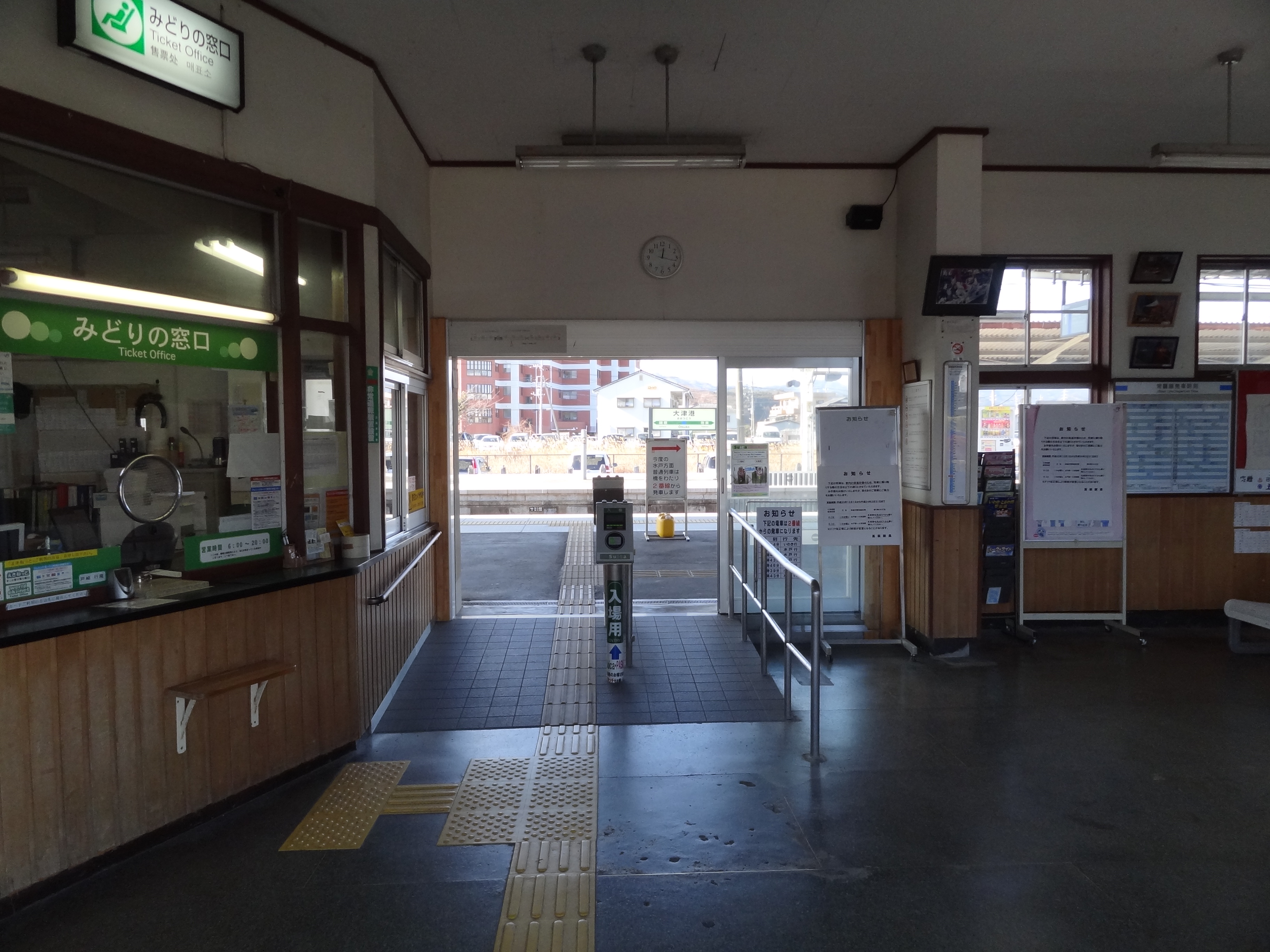 JR東日本・常磐線 大津港駅構内